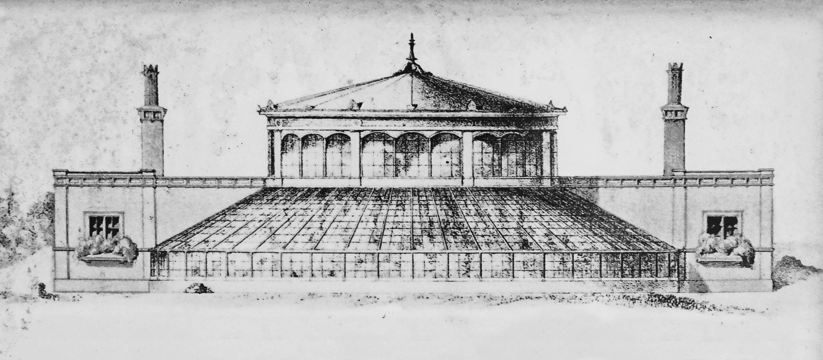 Rosendals orangeri ritning